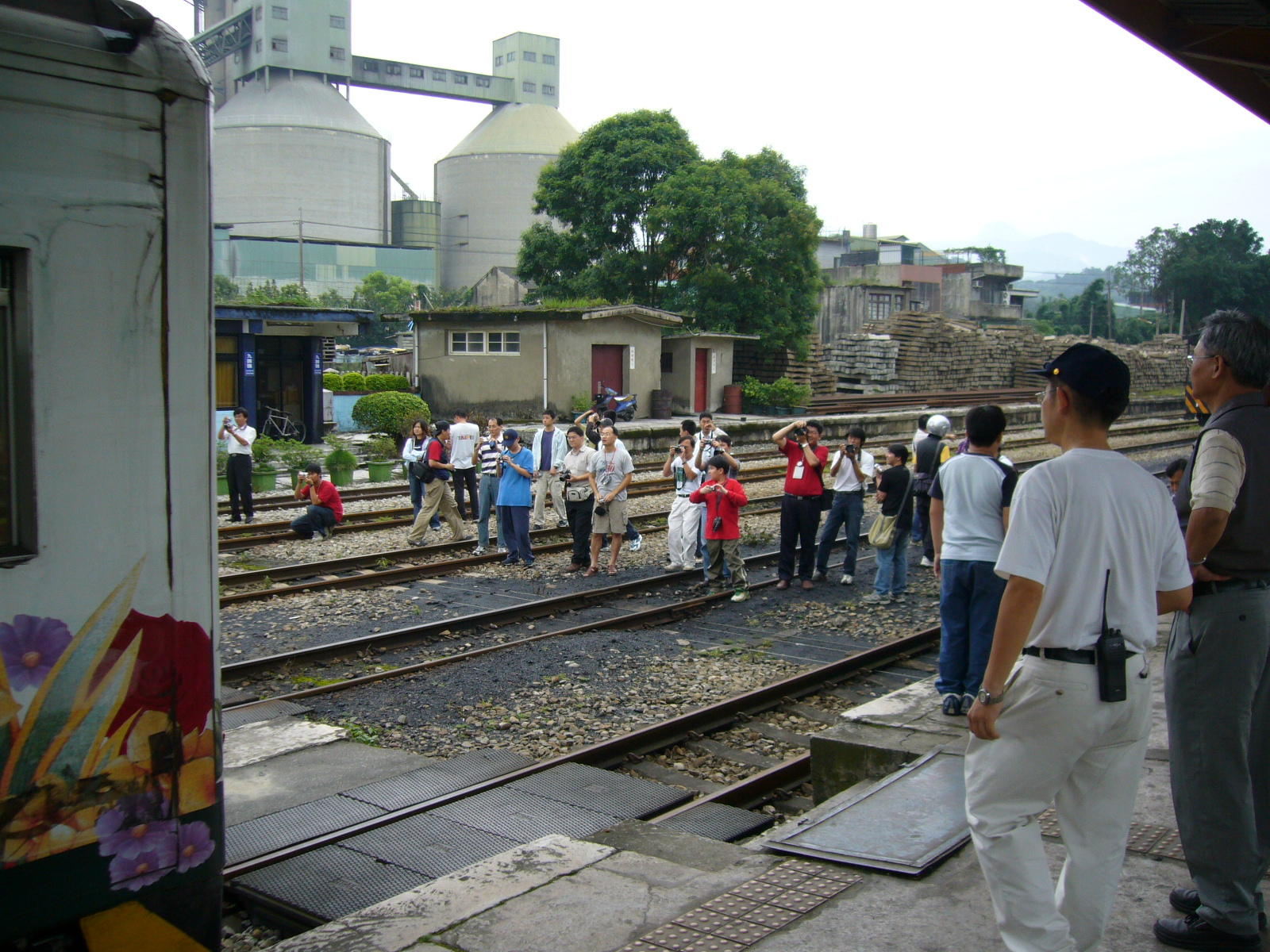 一群鐵道迷在臺鐵內灣線九讚頭站攝影。